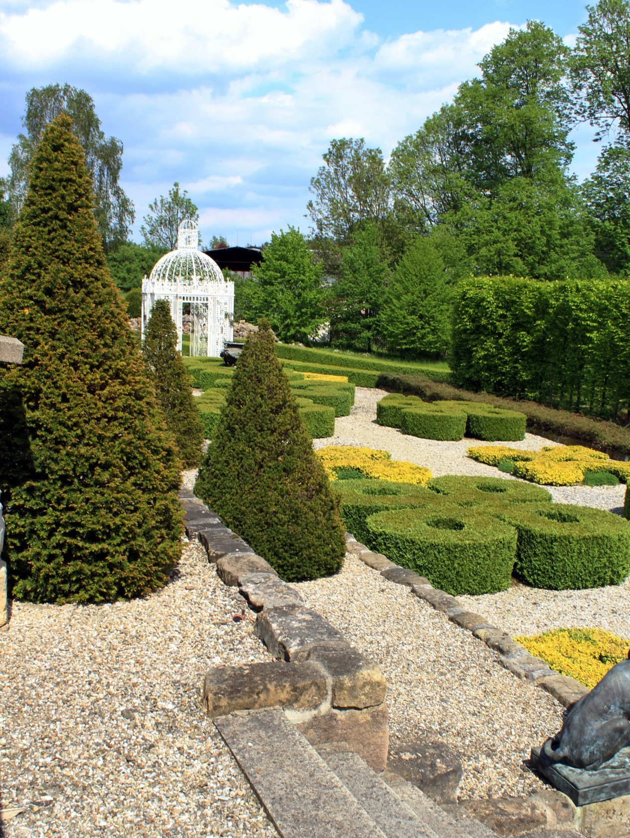 Palmeho dvůr v Jablonném-Markvarticích